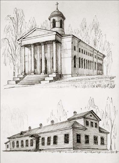 Так выглядела кирха в Новосаратовке